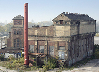 Glashütte Gerresheim. Ehemalige Elektrozentrale. Glasmacherviertel, Düsseldorf-Gerresheim.